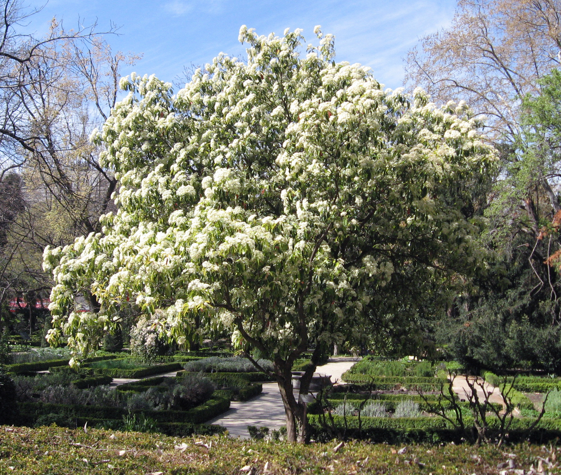 Photinia serratifolia. Real Jardín Botánico de Madrid.